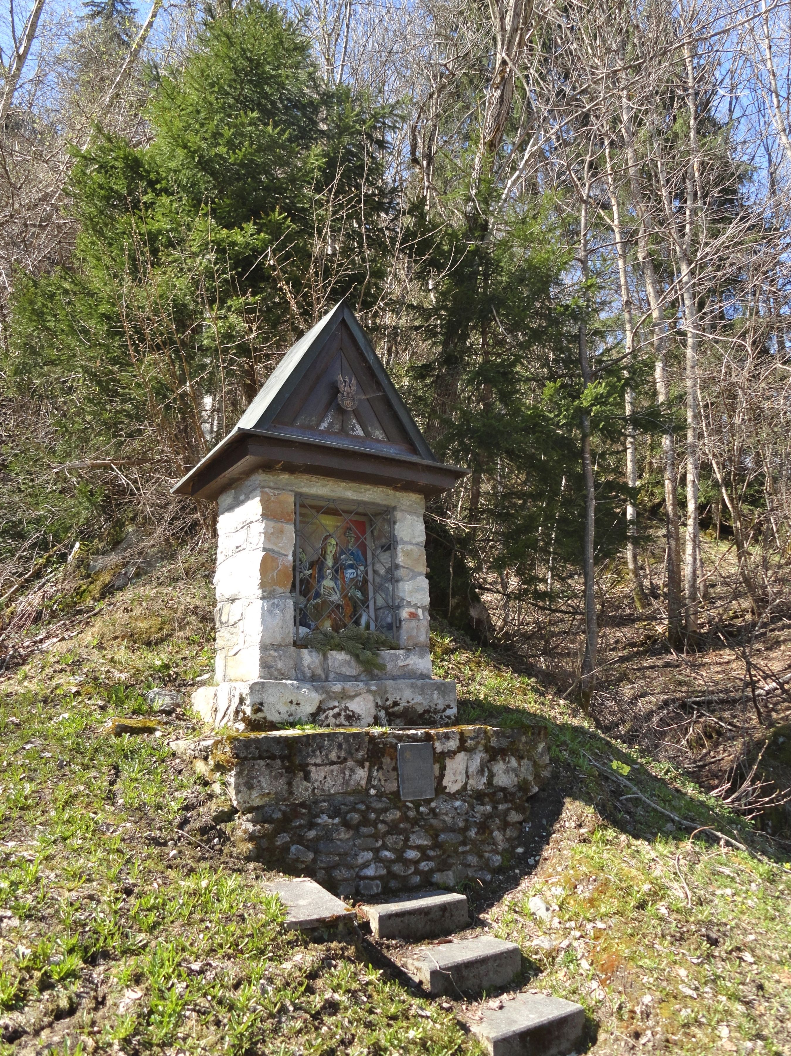 Tafel am Polenweg bei Rueun